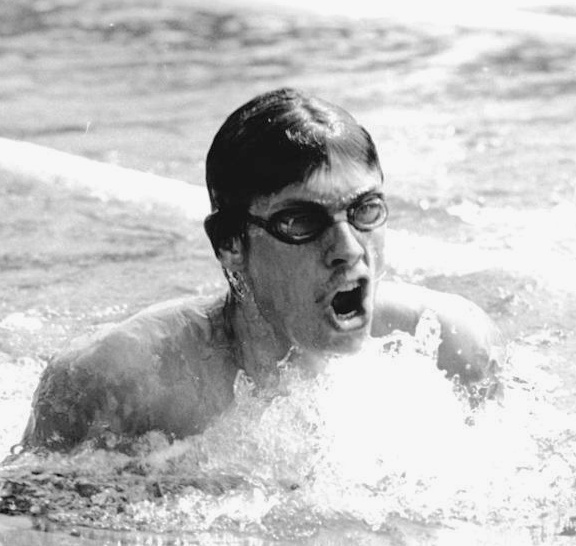 Jörg Walter ADN-ZB Kluge 4.8.79-St- Brandenburg: 30. DDR-Meisterschaften im Sportschwimmen- 3. Tag- Recht erfolgreich schnitt bisher der 32jährige Erfurter Jörg Walter (SC Turbine) ab. Gold über 100 m Brust und 200 m Lagen Silber in der 4 x 100-m-Lagenstaffel und Brinze in der 4 m 100-m-Freistilstaffel. Bitte Finalergebnis vom ADN am 5.8.79 beachten.